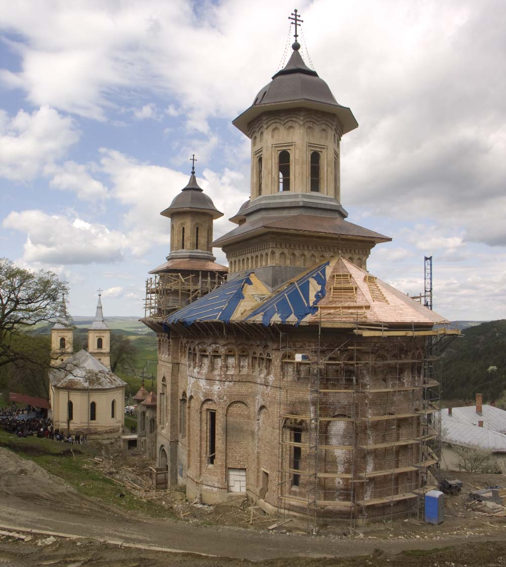 Ridicarea noii biserici ortodoxe în spatele celei greco-catolice. Un exemplu de "dialog interconfesional" în Ardeal